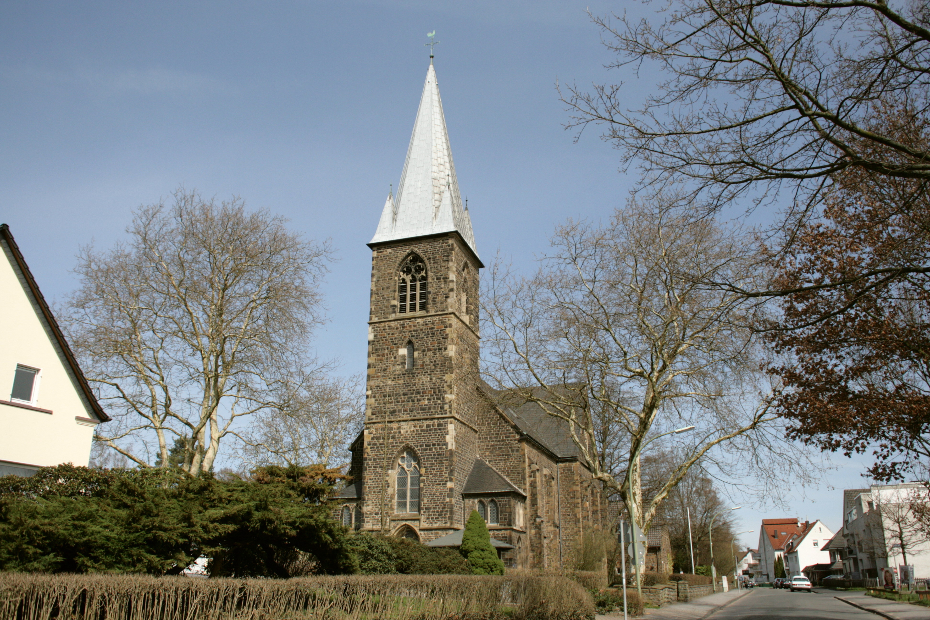 Evangelische Kirche, Steinhügel in Witten-Heven